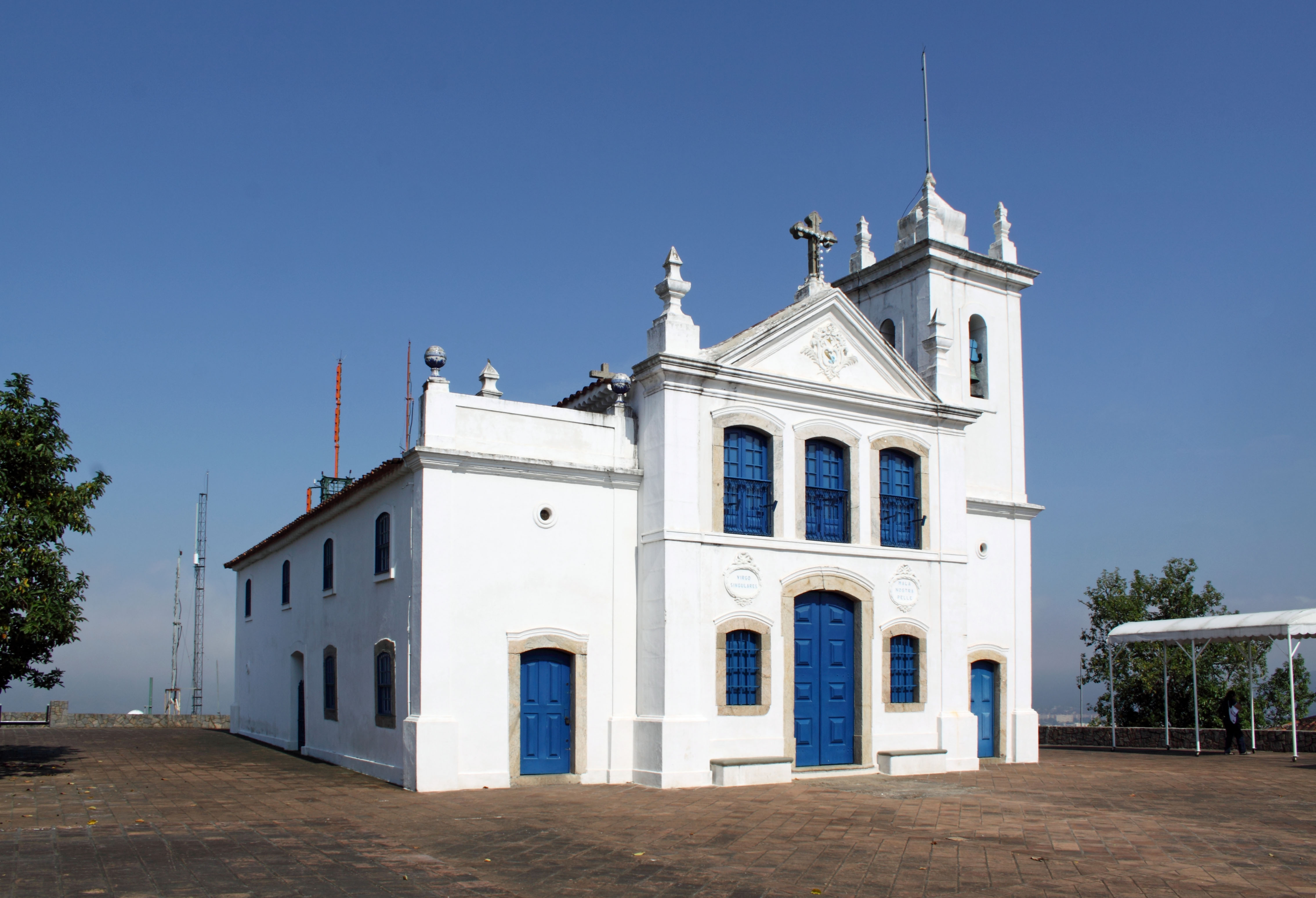 Atribui-se a sua fundação ao padre Manuel de Araújo na segunda metade do século XVIII. Em 1771 a igreja foi restaurada contando com doação de extensa área de terras feita por José Rodrigues de Aragão, feita à Irmandade de Nossa Senhora da Pena. A igreja, construída no alto de um outeiro no bairro da Freguesia, tem frontão de linhas clássicas ladeado por torre campanário do lado de epístola; possui nave única, corredores laterais e sacristia ao fundo (IPHAN)